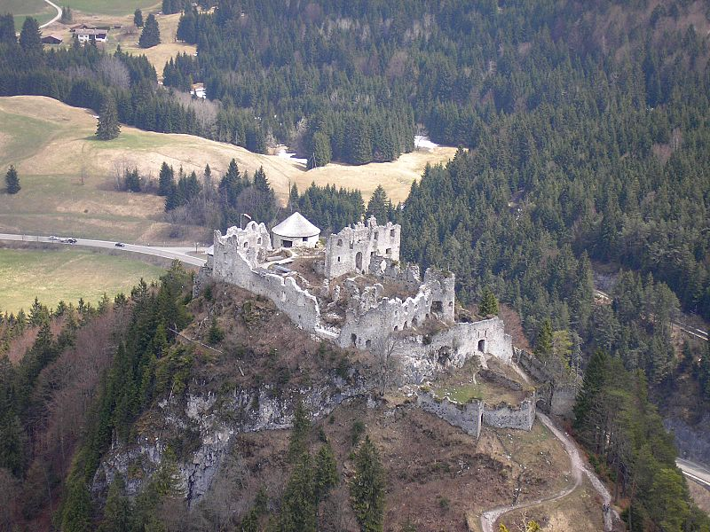 Burg Ehrenberg bei Reutte (Tirol). Die Burg von der Festung Schloßkopf.